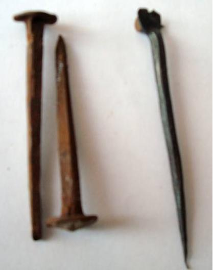 Photo de clous forgés et d'un clou découpé et forgé (village des pêcheurs au Mali)